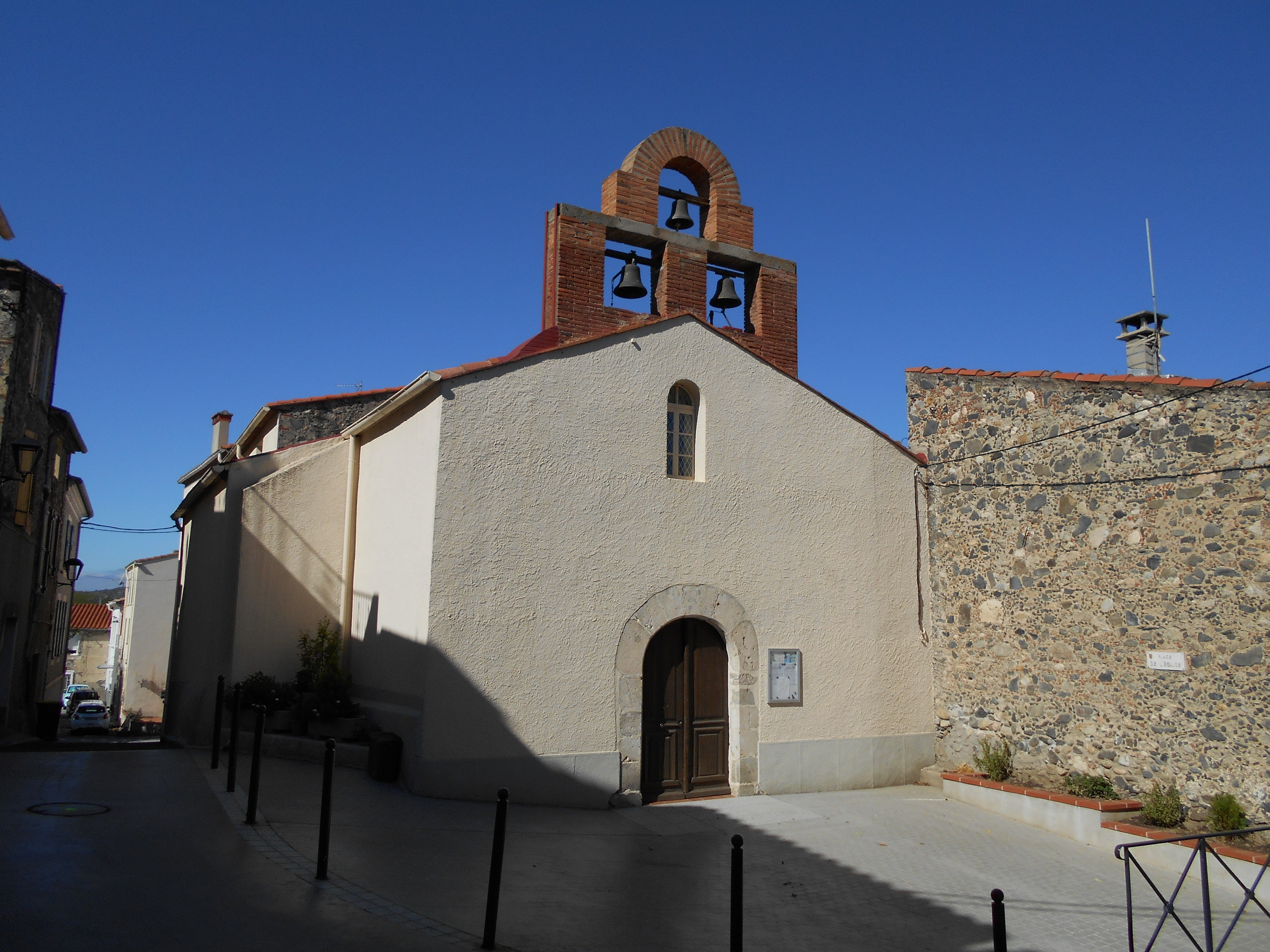 Sant Pantaleó de Cases de Pena